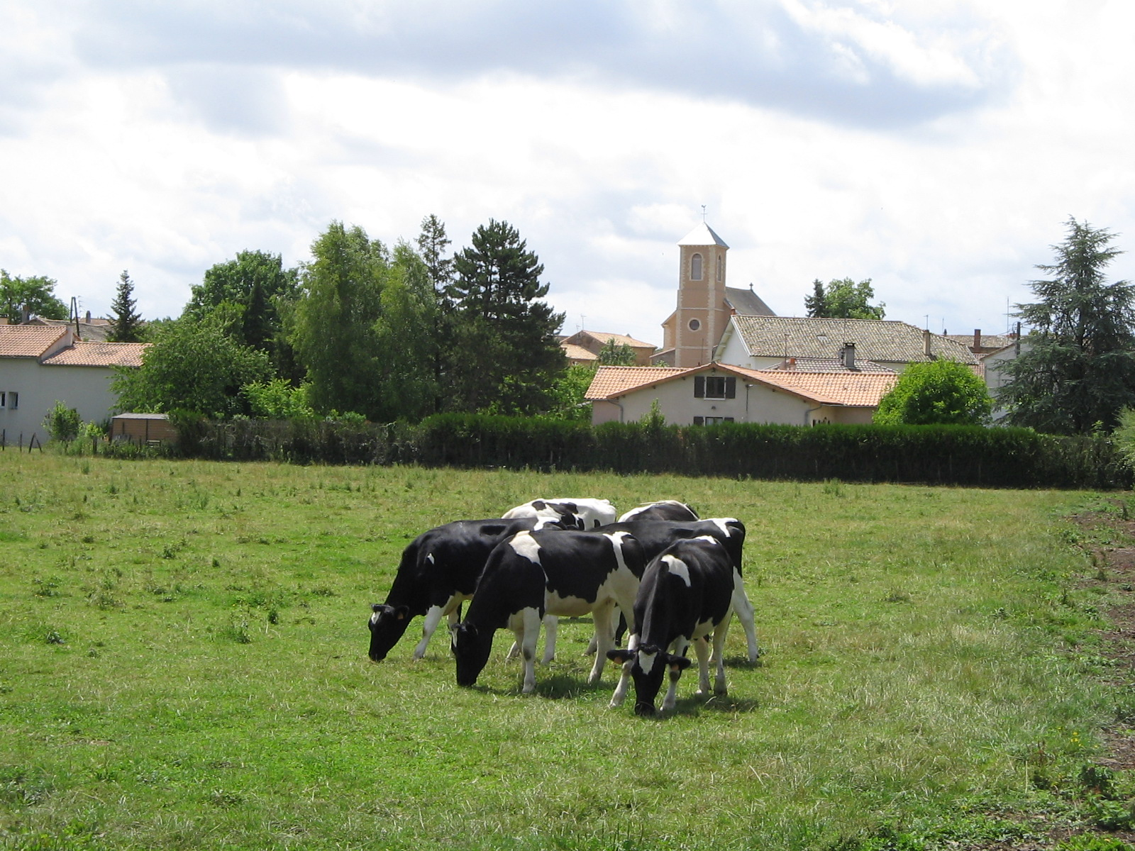 Vue de Lezay (79) en juin 2011